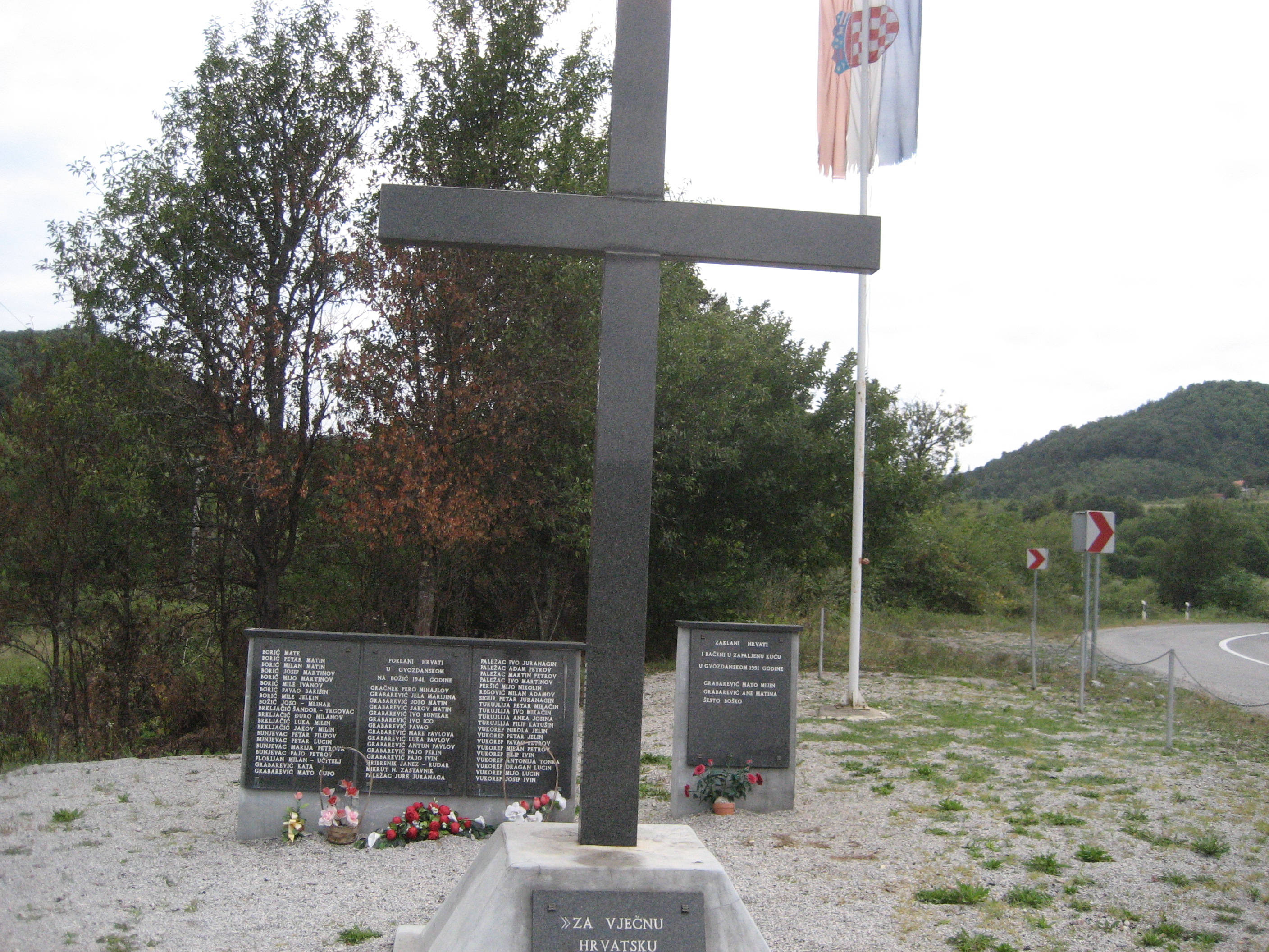 Spomenik Hrvatskim zrtvama cetnickog pokolja iz 1941 u Gvodzanskom